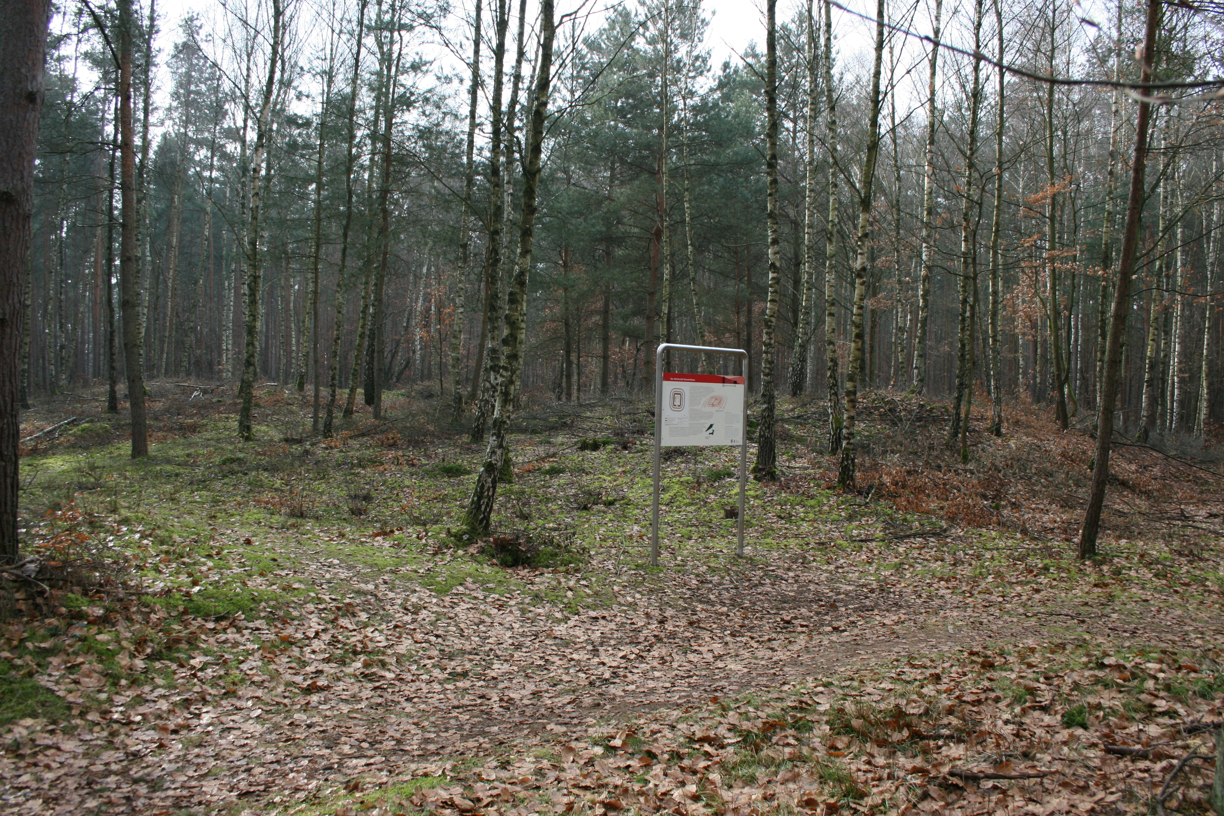 Kleinkastell Neuwirtshaus bei Hanau-Wolfgang, Hessen. Ansicht von NO.